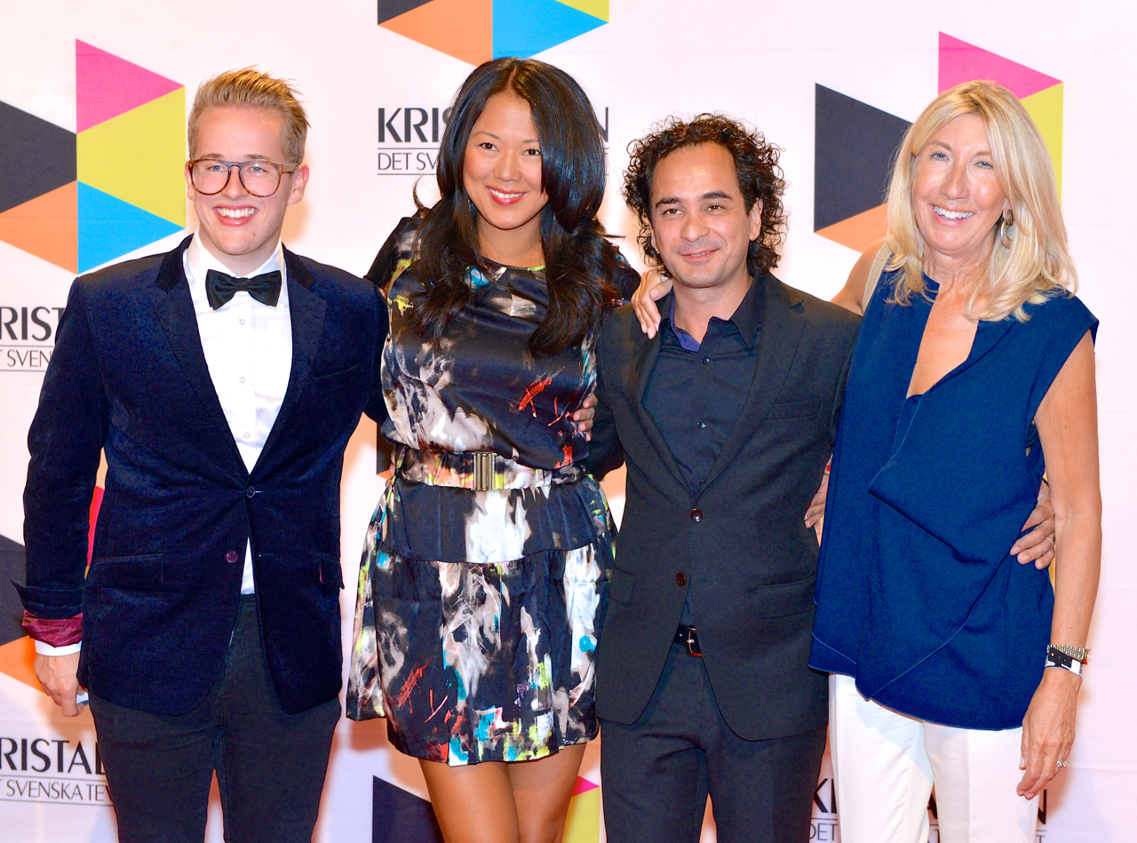 TV4-programmet Sveriges mästerkock blev vinnare av Kristallen för Årets dokusåpa på Kristallengalan den 30 augusti 2013. Markus Aujalay (kock, domare) och Lena Styren (producent) till höger.